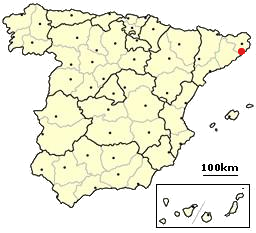 Sant Feliu de Guixols Spain location